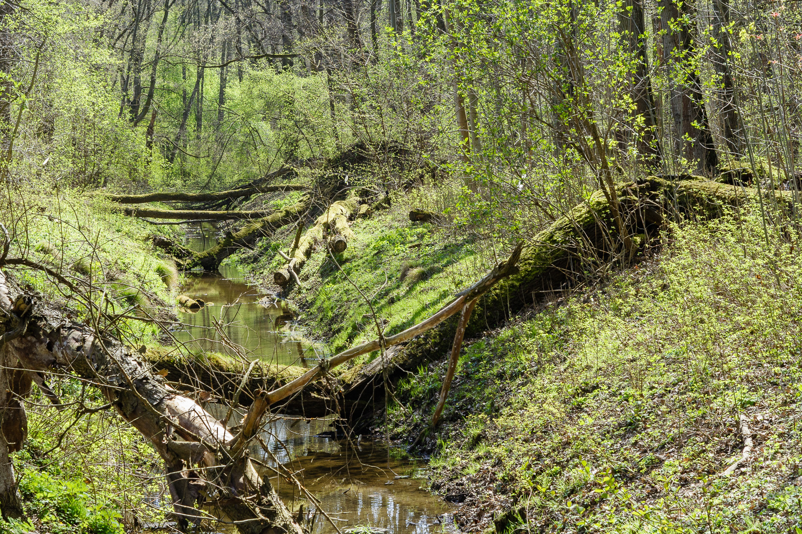 Rudawka w Lasku Bielańskim. This is a photography of Natura 2000 protected area with ID PLH140041